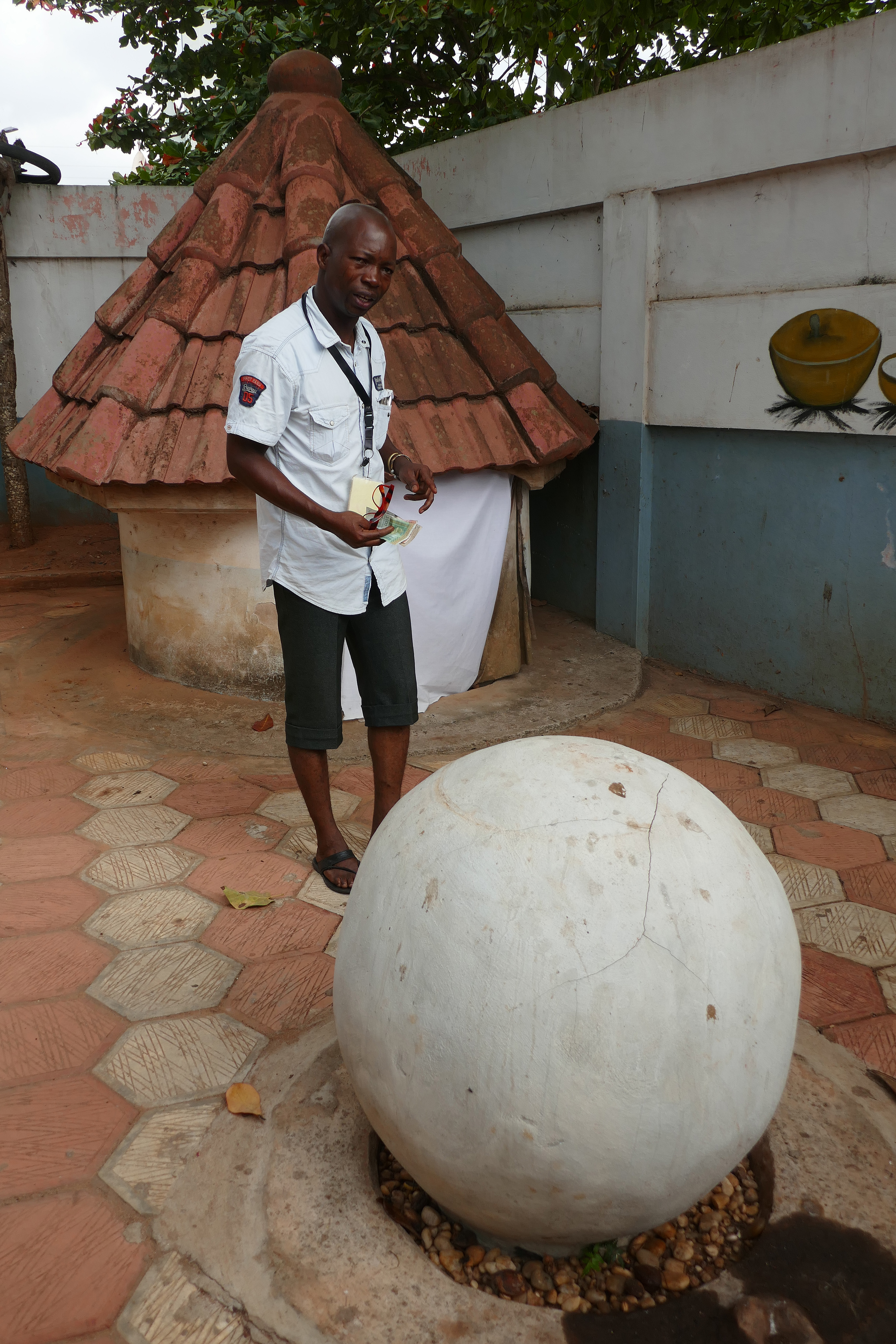 Temple des Pythons (Ouidah, Bénin) : le guide présente la jarre sacrée blanche retournée, utilisée tous les 7 ans.